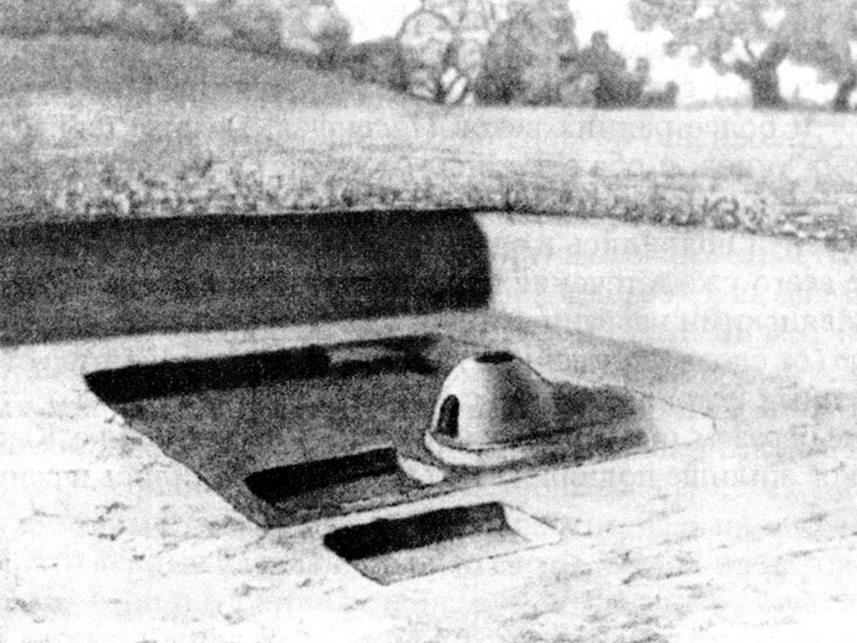 Остатки славянского жилища с печью роменской культуры. Раскопки у села Монастырище близ Ромен, проведённые Н. Е. Макаренко и В. В. Хвойко в начале XX века.